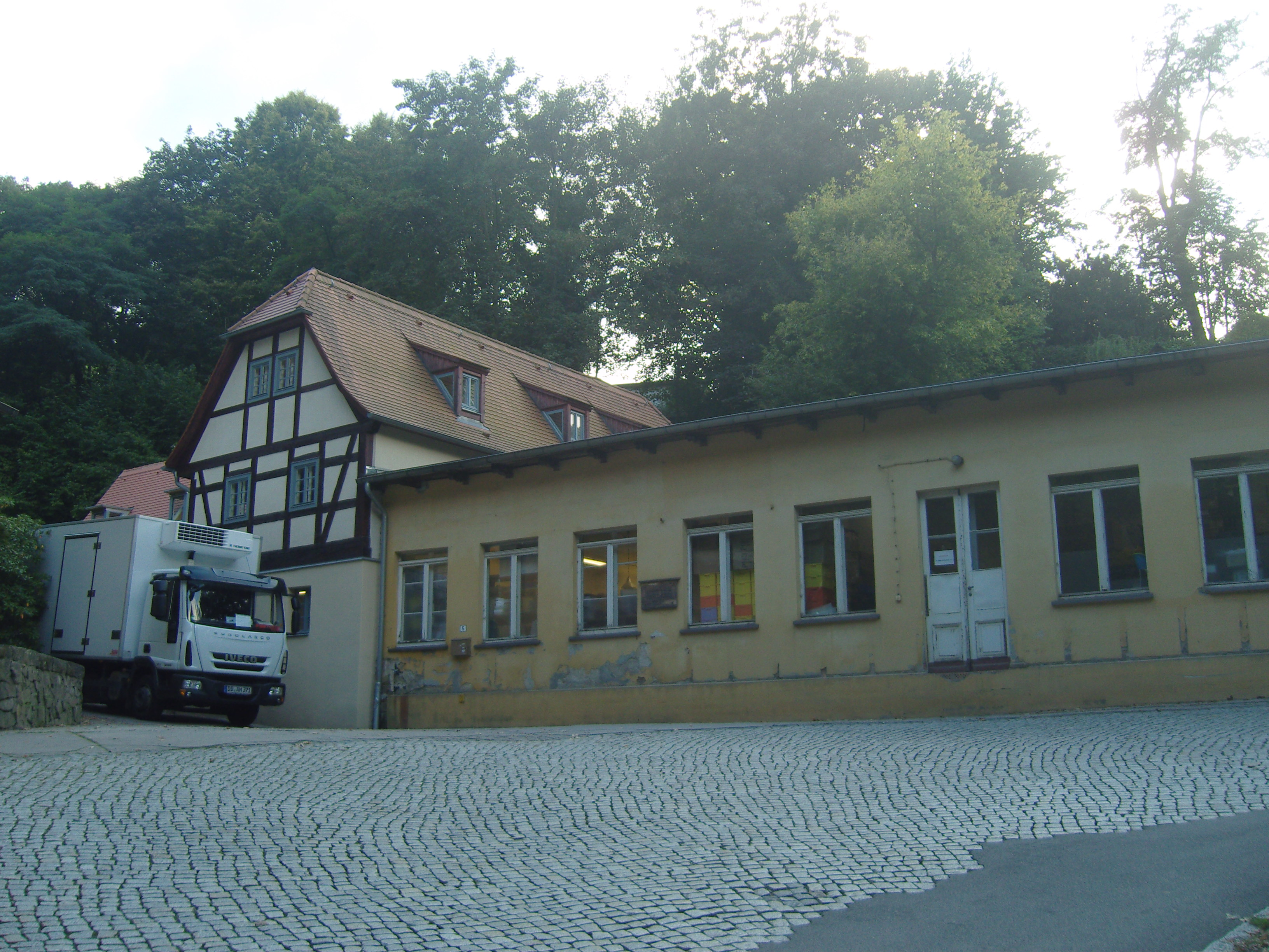 Denkmalgeschützte Schweizerei, ehem. Gasthaus mit gestalteter Naturanlage in der Ulrichstraße 5 in Dresden-Loschwitz